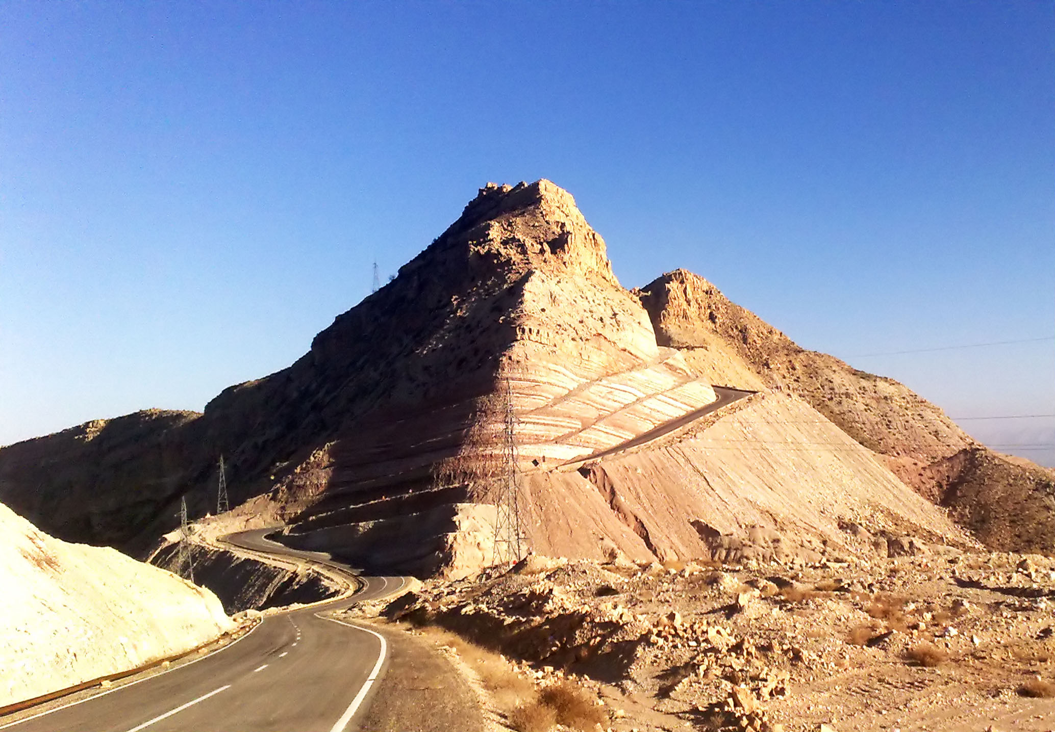 کوه هوا، بخش علامرودشت، جنوب استان فارس